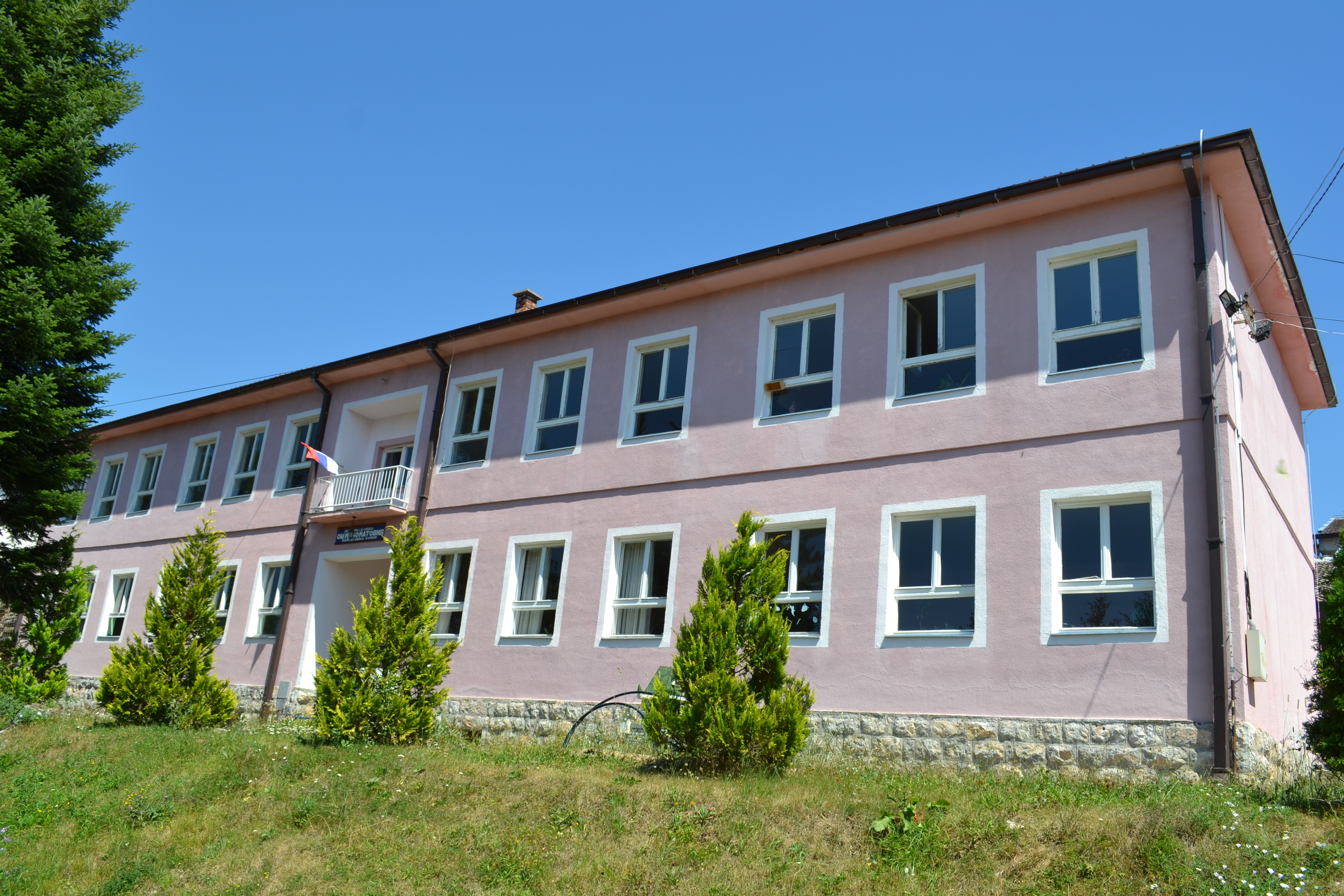 OŠ Mićo Matović Katići